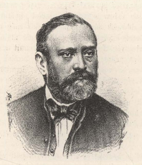 Röck István János (Pest, 1812. november 1. – Budapest, 1882. november 10.) gépgyáros, fővárosi bizottsági tag.